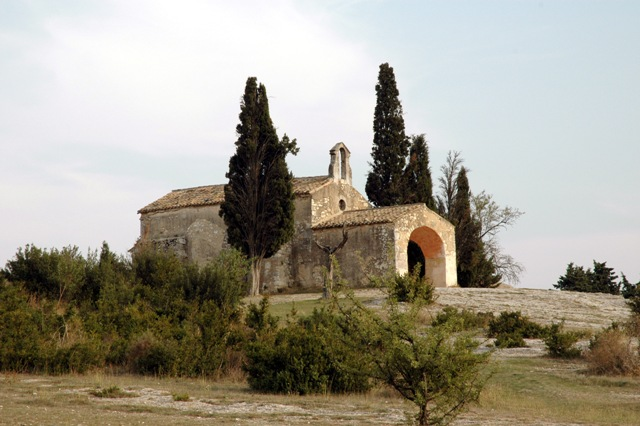 Egalière vault